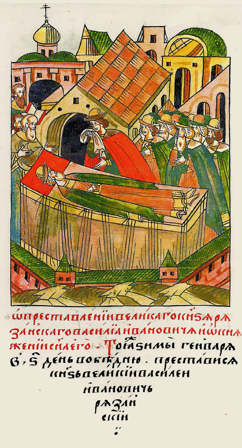 О кончине велико- го князя Рязанского Василия Ивановича и о княжении его сына. В ту же зиму января в 6 день, в обедню, преставился великий князь Рязанский Васи- лий Иванович